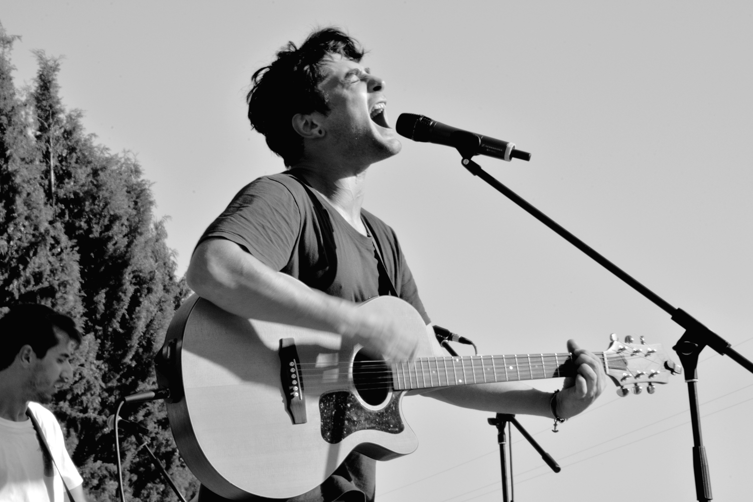 Gio Sada - Barismoothsquad